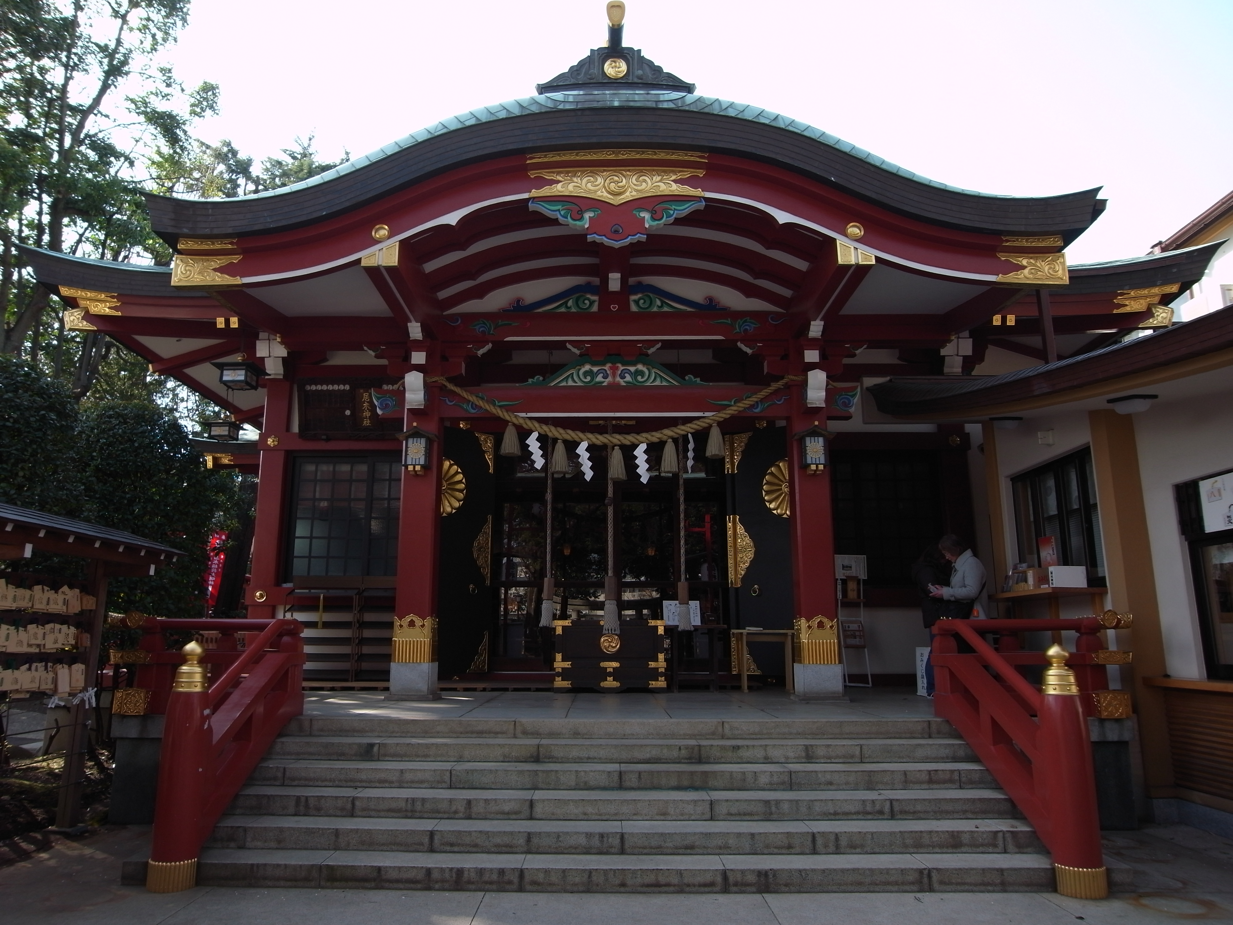 居木神社 拝殿